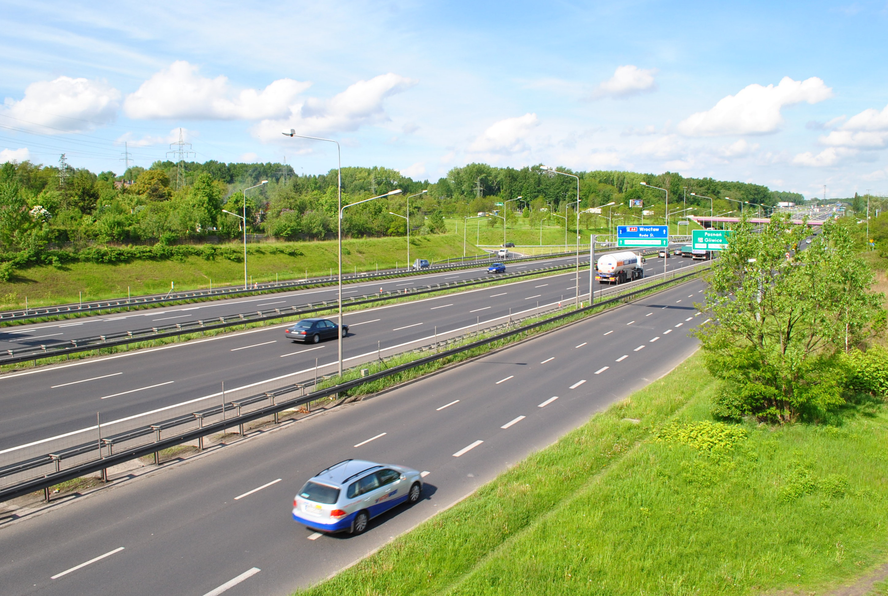 Katowice. Autostrada A4 na wysokości ul. Żeliwnej